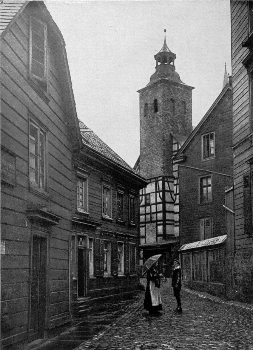 Alte Wichlinghauser Kirche, niedergebrannt 1927